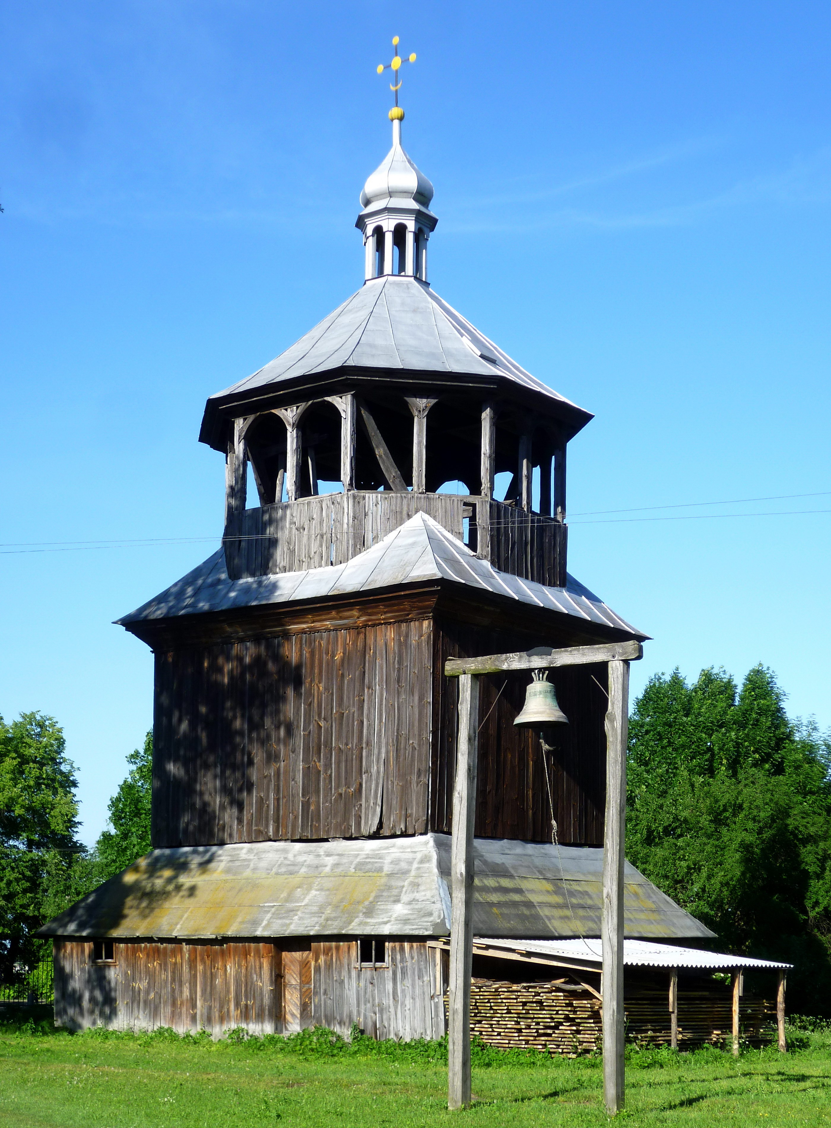 Дзвіниця церкви Різдва Богородиці (1860 р.) - в м.Угневі (вул.Валова, 7) Сокальського району Львівської області України